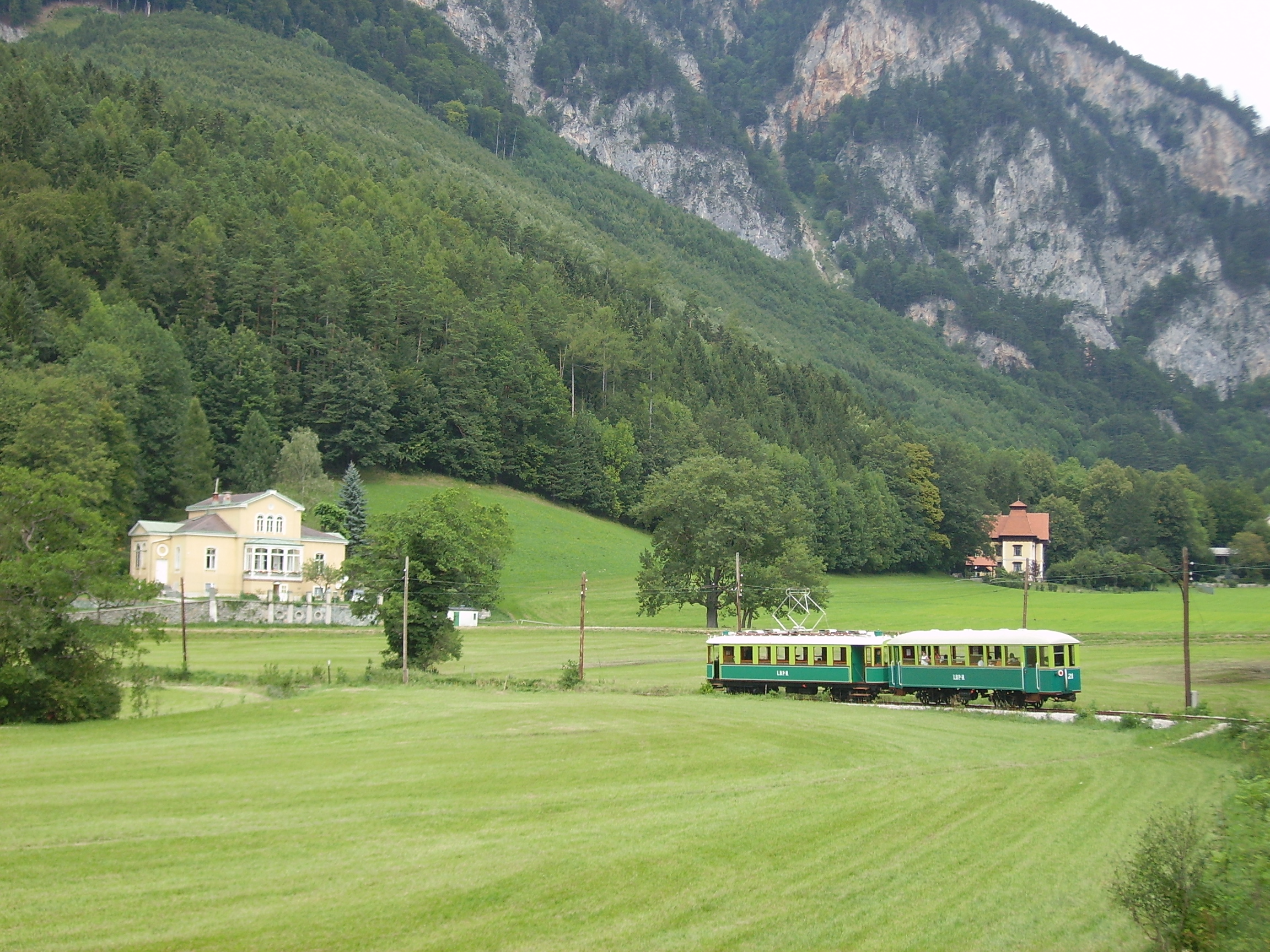 Reichenau - Thalhofstr Museumsbahn